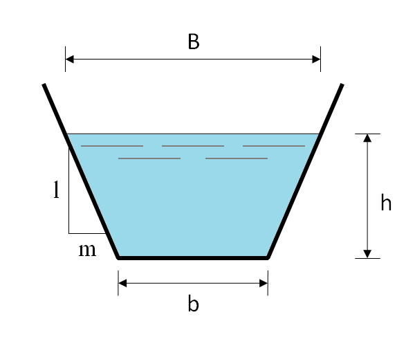 Éléments géométriques pour une section de canal trapézoidale.